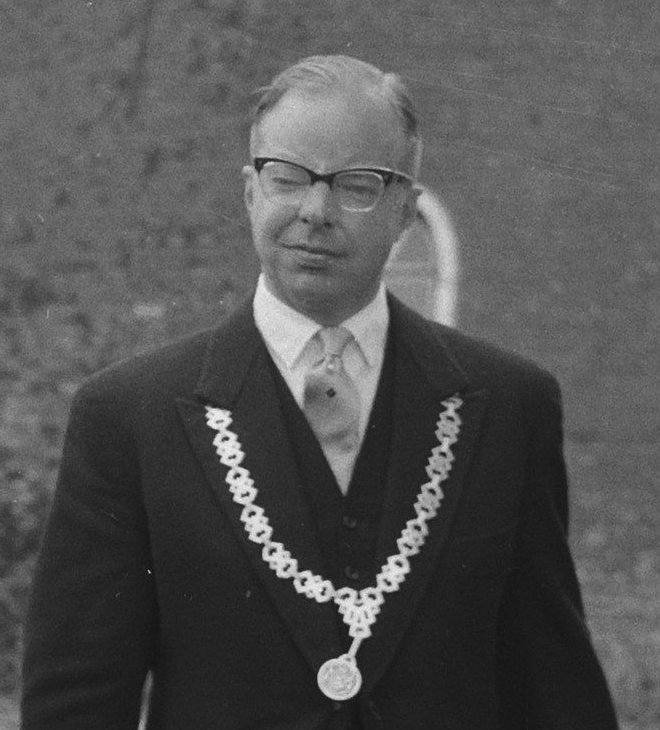 Collectie / Archief : Fotocollectie Anefo Reportage / Serie : [ onbekend ] Beschrijving : Werkbezoek mr. J. Klaasesz aan Heerjansdam. Mr. J. Klaasesz en de burgemeester Datum : 13 juni 1961 Trefwoorden : burgemeesters, werkbezoeken Persoonsnaam : Klaasesz, Jan Fotograaf : Lindeboom, Henk / Anefo Auteursrechthebbende : Nationaal Archief Materiaalsoort : Negatief (zwart/wit) Nummer archiefinventaris : bekijk toegang 2.24.01.03 Bestanddeelnummer : 912-5957